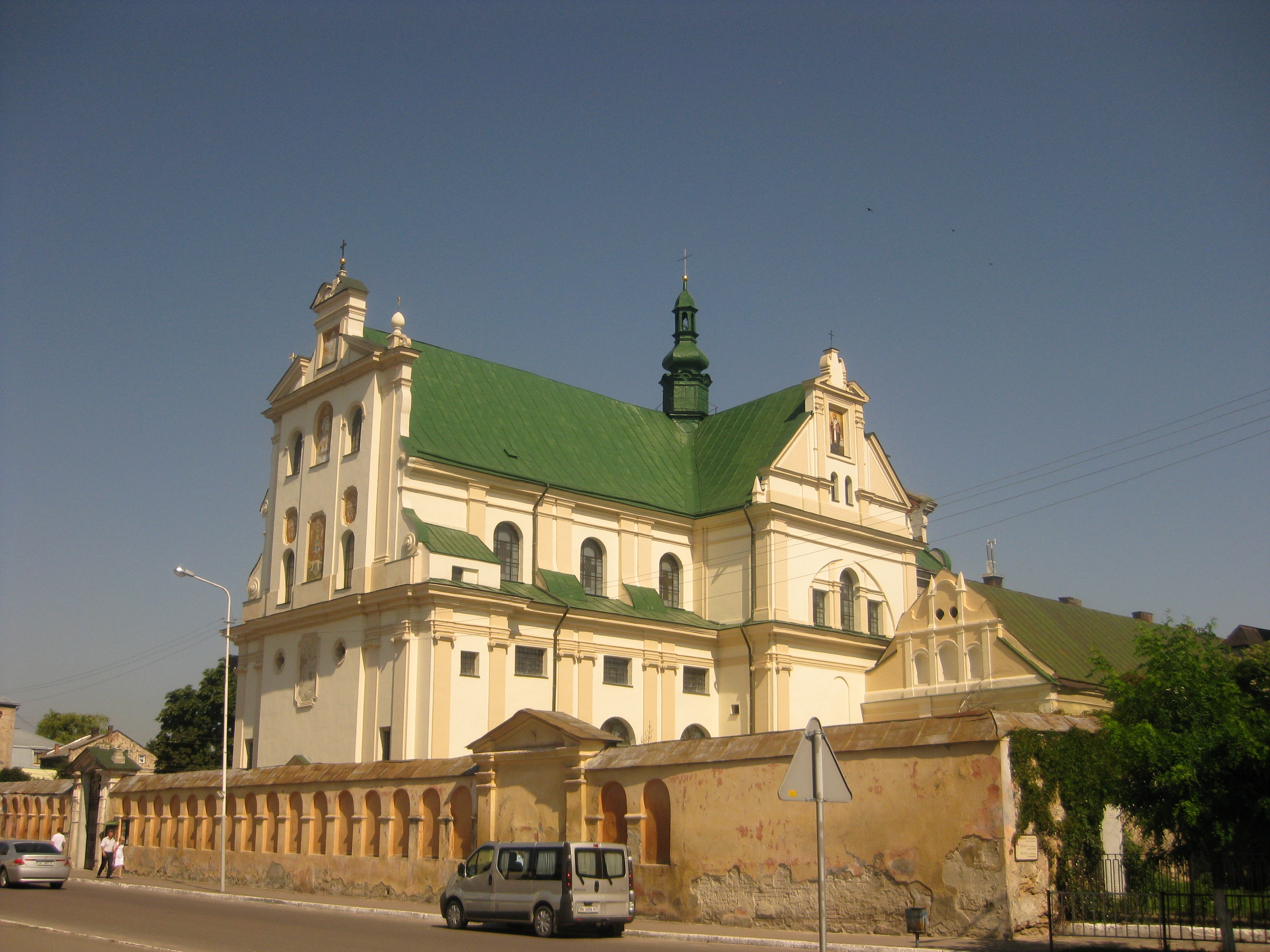 Домініканський монастир (мур.), Жовква, вул.Львівська, 5